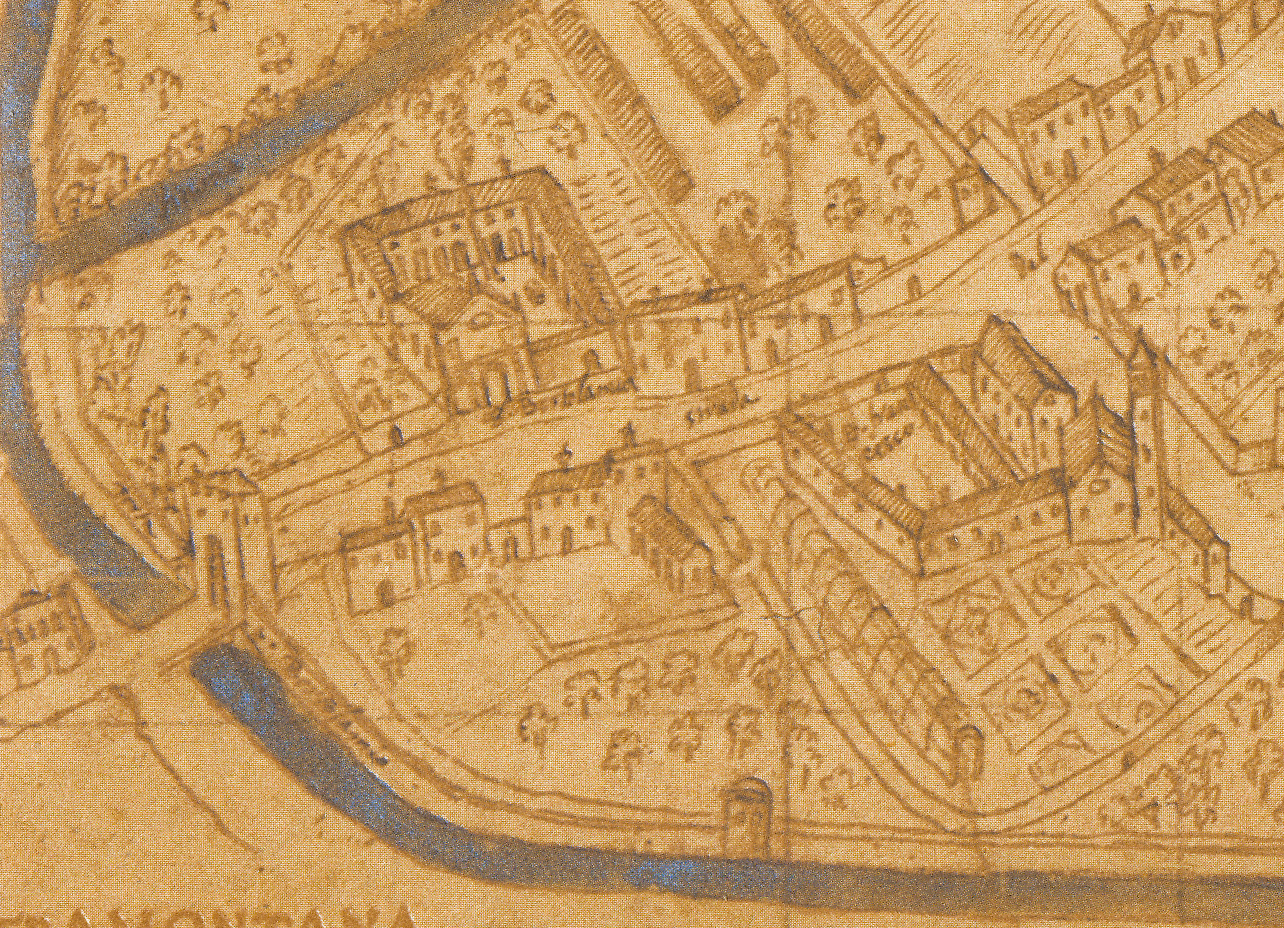 Vicenza - Pianta Angelica 1580 - particolare del Borgo Pusterla - Monasteri di San Bortolo e San Francesco